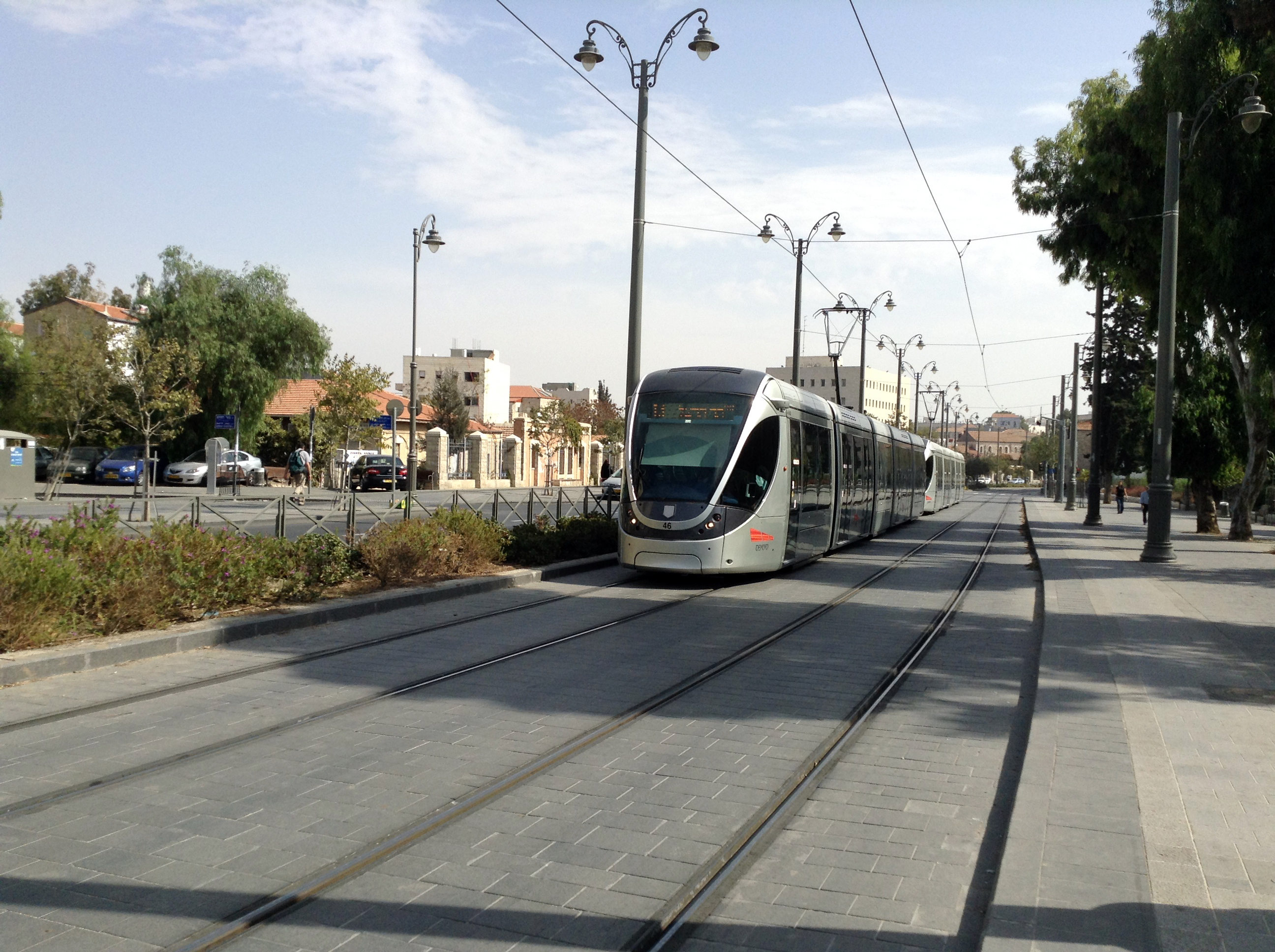 Иерусалимский трамвай на ул. Яффо.